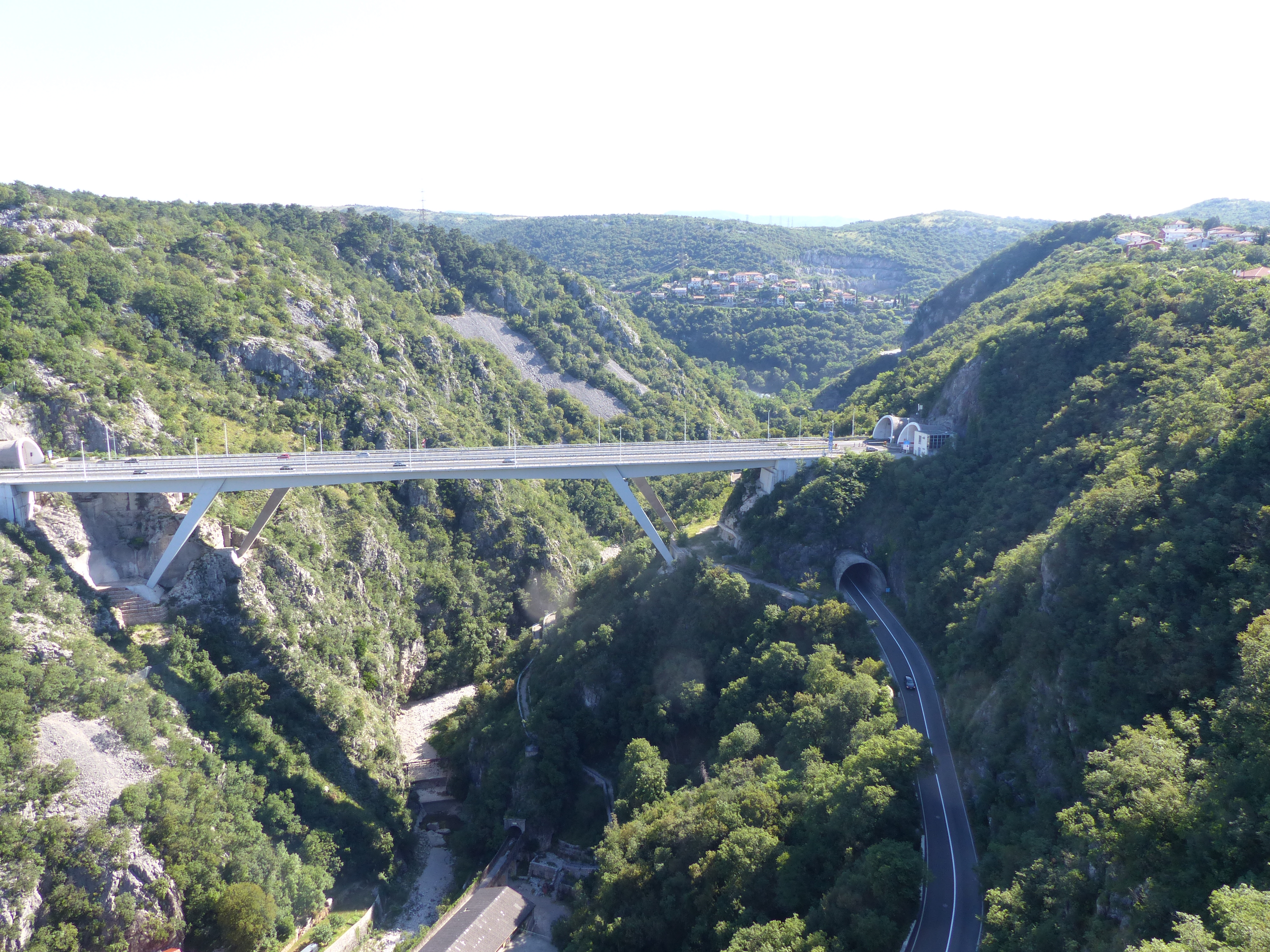 A felvétel 2016. június 28-án készült a Fiuméhez (Horvátország) tartozó Trsat erődjéből.Kilátás Fiumére. A trsati erődöt és a lépcsősort is a Frangepánok építtették a 13. században, itt volt a család temetkezési helye, a legenda szerint az erődben a Bécsújhelyen kivégzett Frangepán Ferenc szelleme kísértett. 1826-ban a romos erődöt az ír származású Laval Nugent tábornok vette meg és elegáns kastéllyá alakíttatta át. Cimkék: Ferenc Frangepán Laval Nugent Trsat